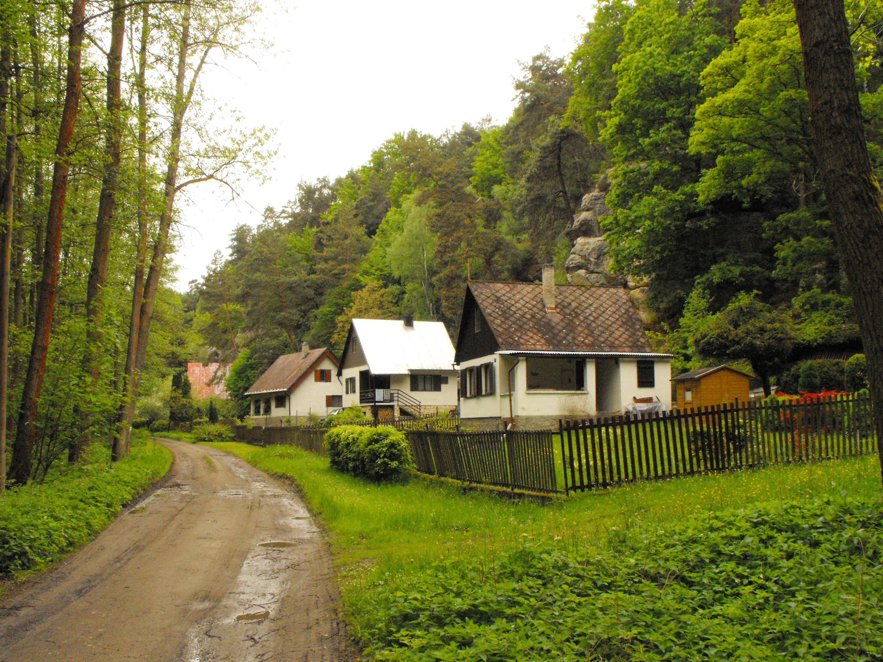 Solejo Kluk, urboparto de Dubá, Ĉeĥio.